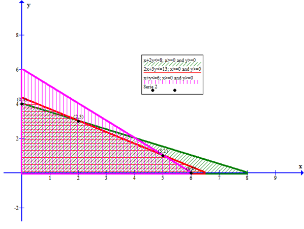 Resolució gràfica del mètode 1.